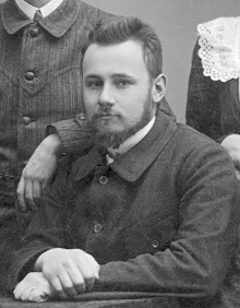 George Vernadsky in Russia